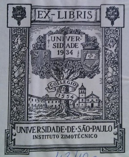 Livro com ex libris no Brasil, USP.